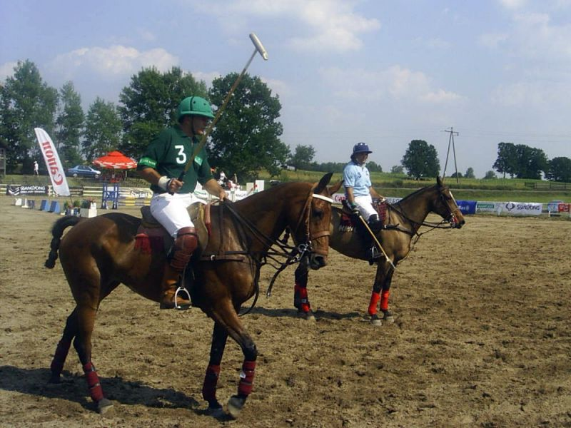 Polo (Gałkowo Cup; Polska)